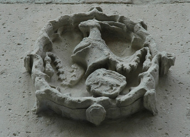 Escut dels Cabrera, Blanes, Girona, (Catalunya).